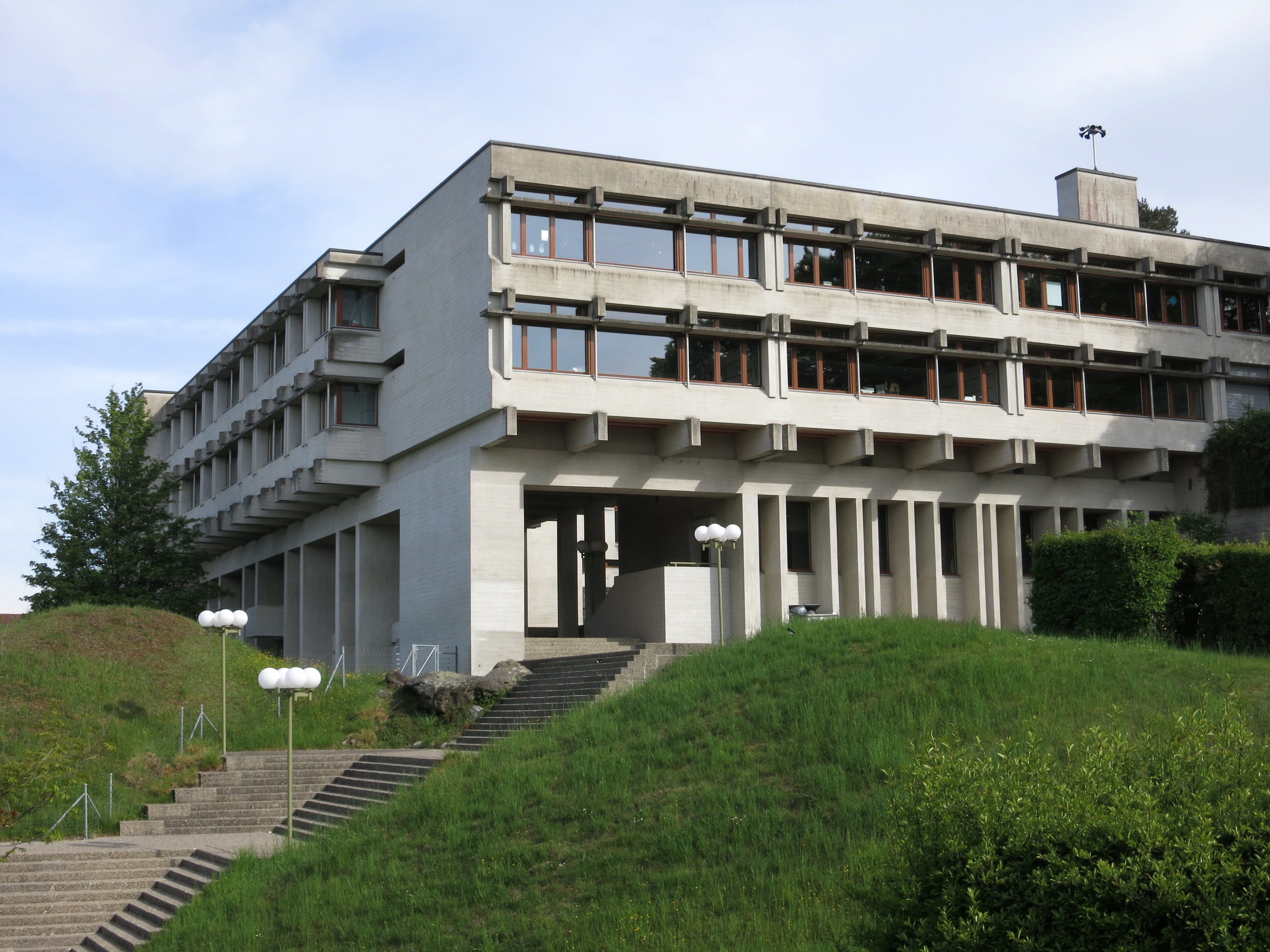 Schulhaus Stettbach